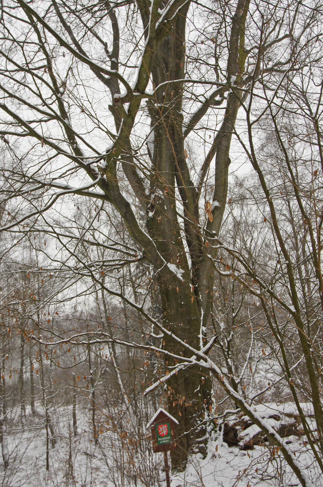 památný strom - Kaasův buk, Horní Rozmyšl, okres Sokolov, Krušné hory